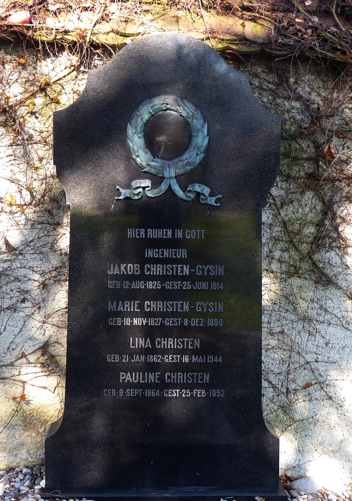 Jakob Christen-Gysin (1825–1914) Ingenieur, Geometer, Regierungsrat, Gemeindefriedhof Muttenz